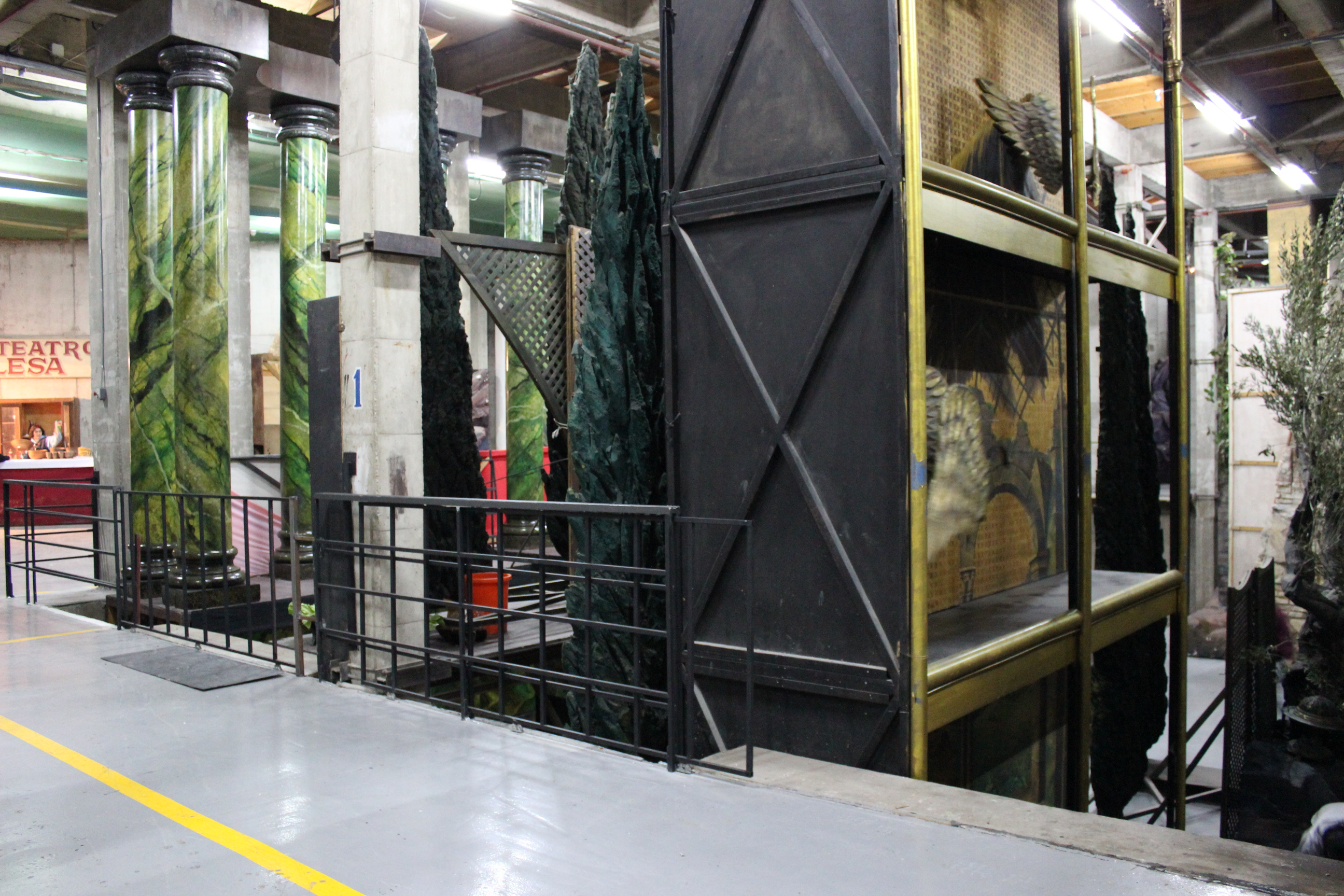 La Passió d'Olesa. Vistes del magatzem de decorats de sota l'escenari i de l'àrea d'elevadors que pugen i baixen aquests decorats d'escena.